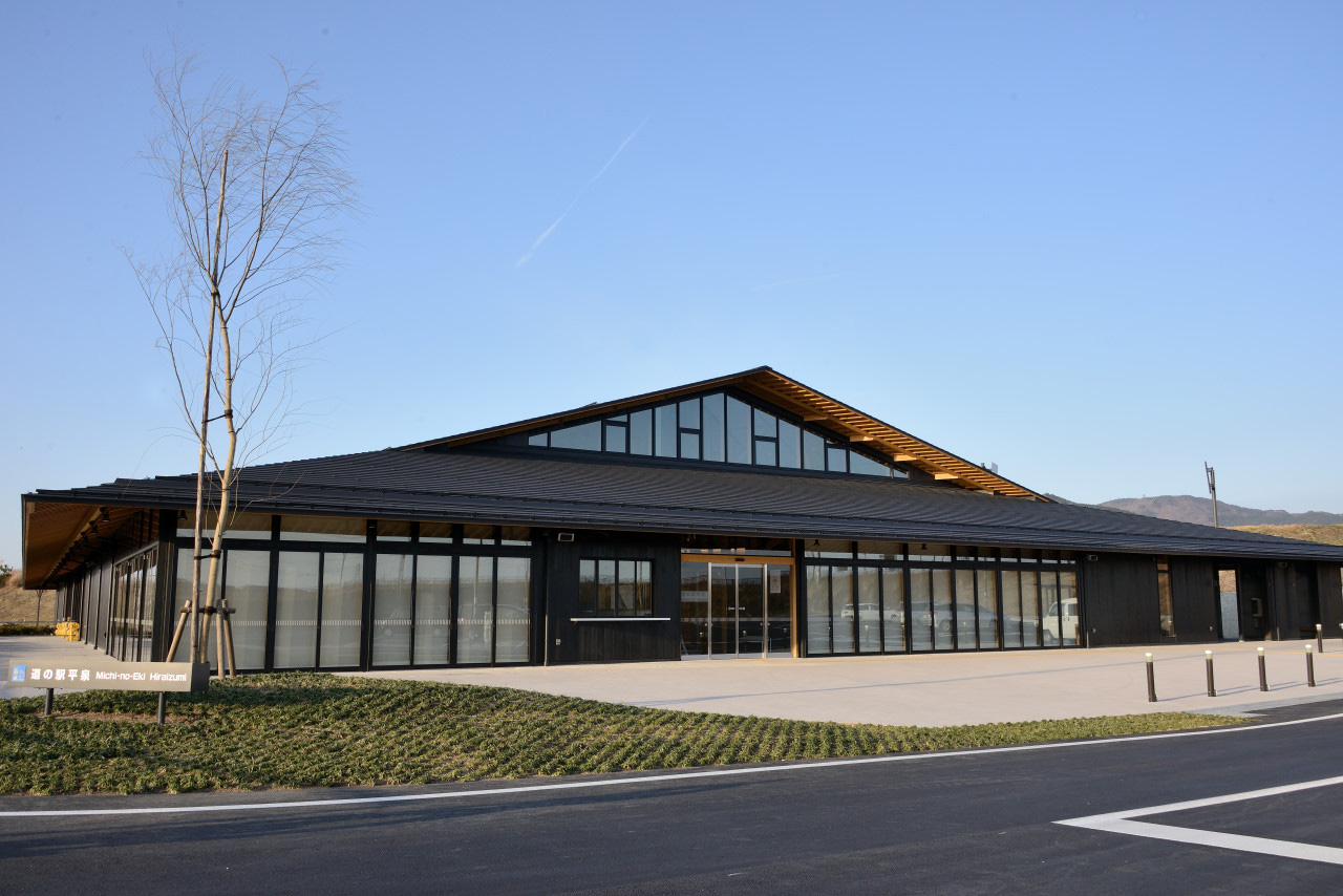 Hiraizumi, Roadside Station, Iwate, Japan. 岩手県にある道の駅「道の駅平泉」